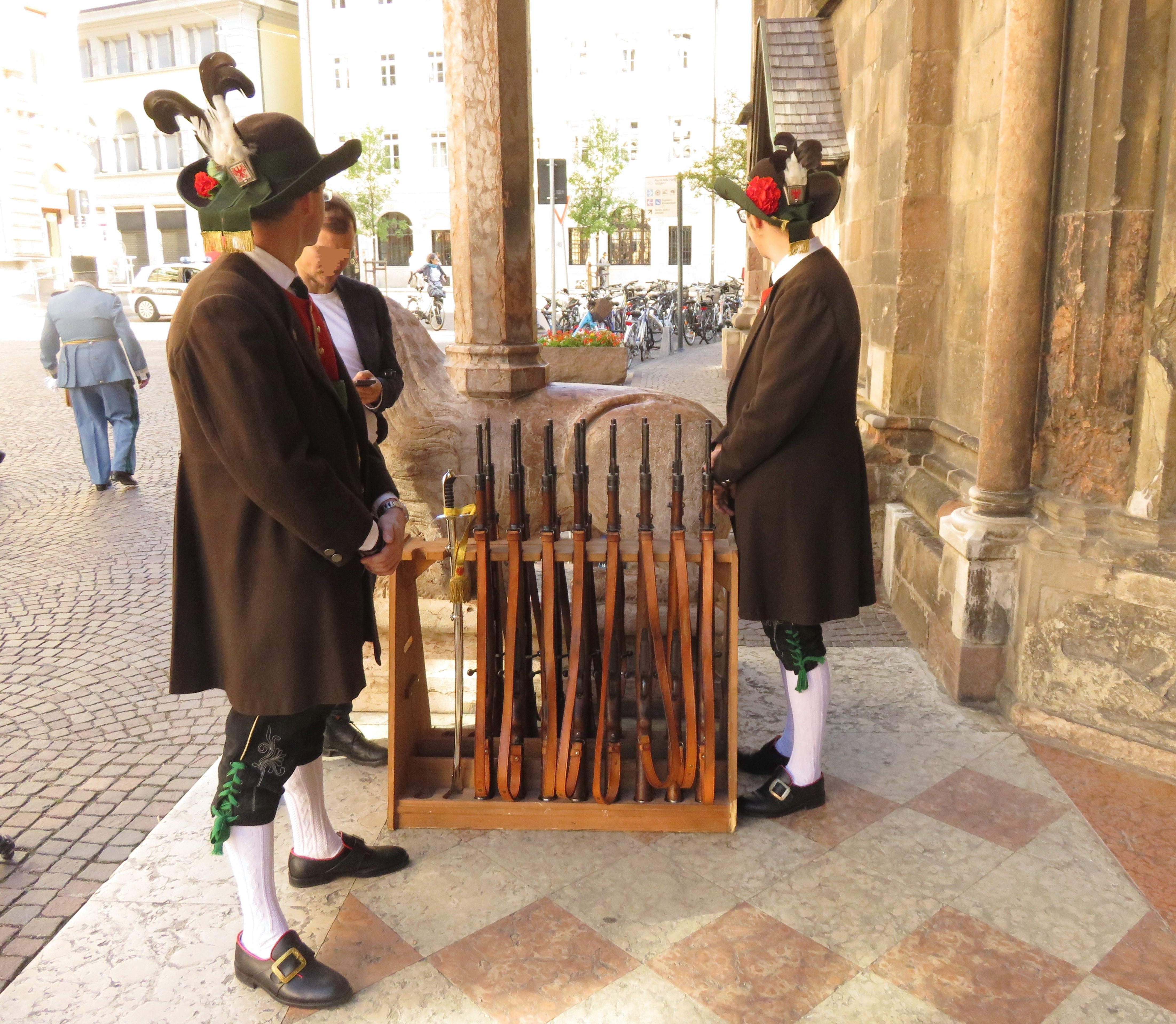 Bolzano, Domenica 10 giugno 2018. Santa Messa e tradizionale processione del Sacro Cuore di Gesù, iniziata alle ore 10 dalla cattedrale. È presente la Musikkapelle.